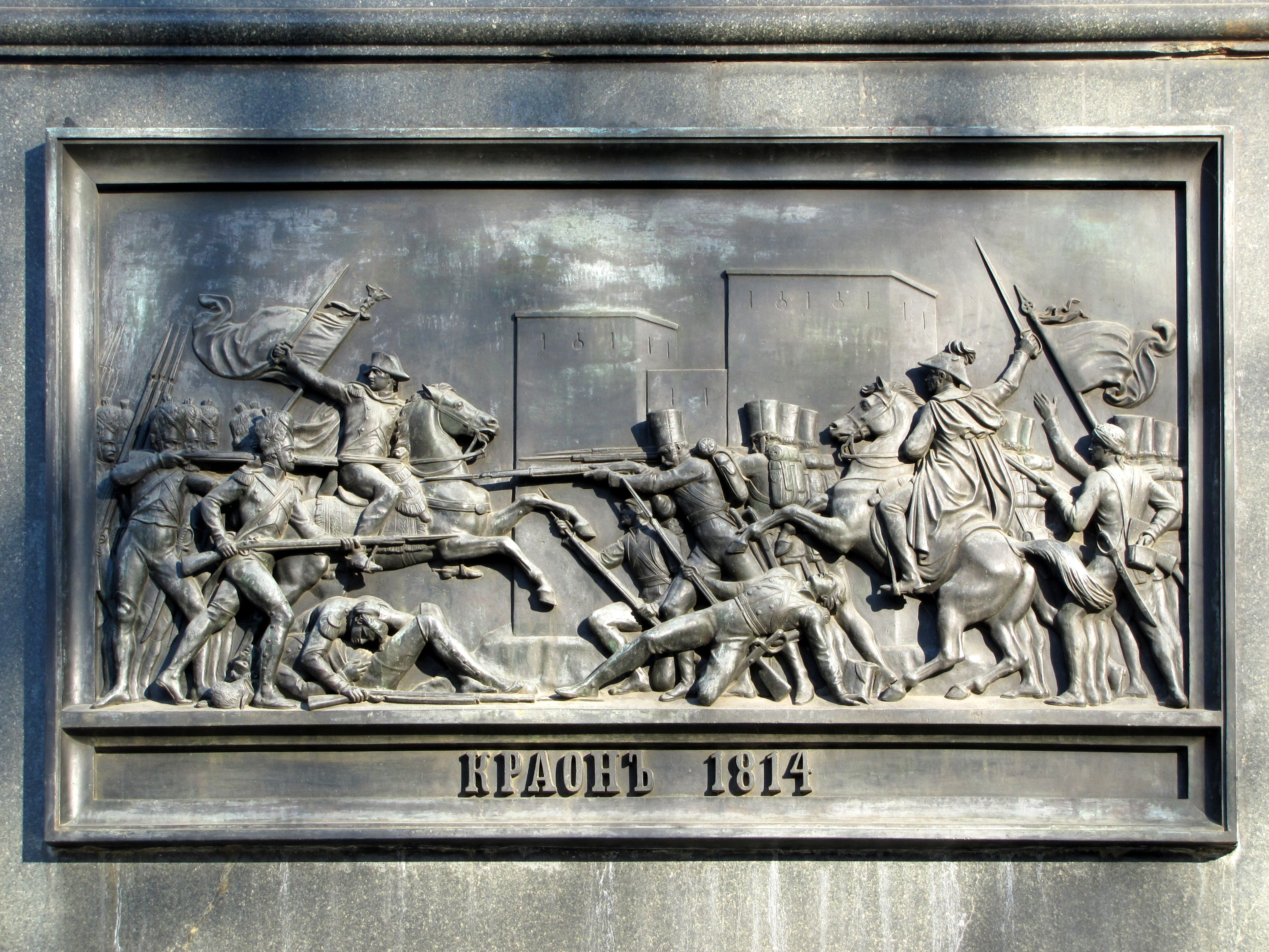 Pomník Voroncova v Oděse